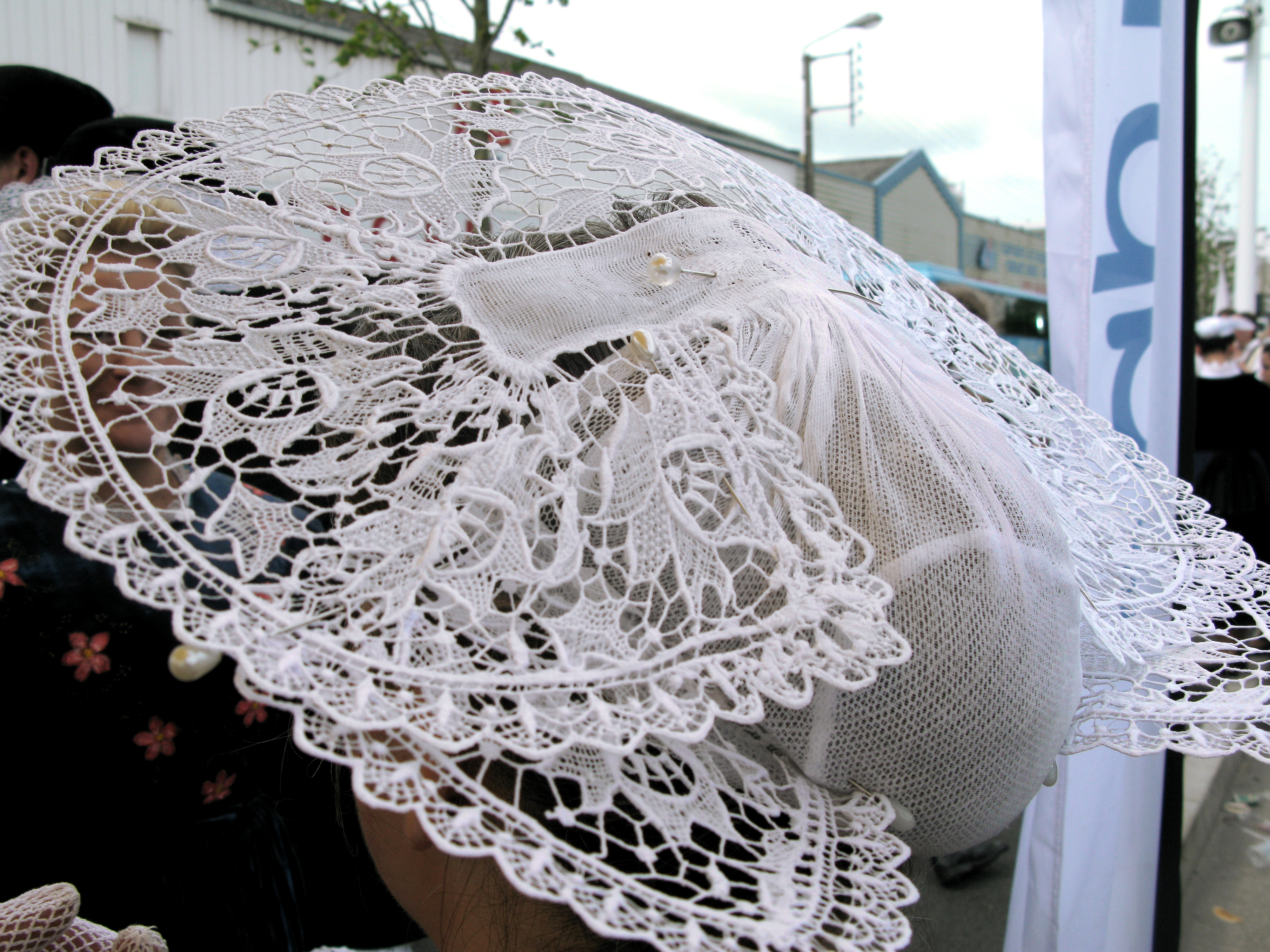 Détails de broderies de coiffe bretonne. Forme de coiffe distinctive du pays de Lorient.